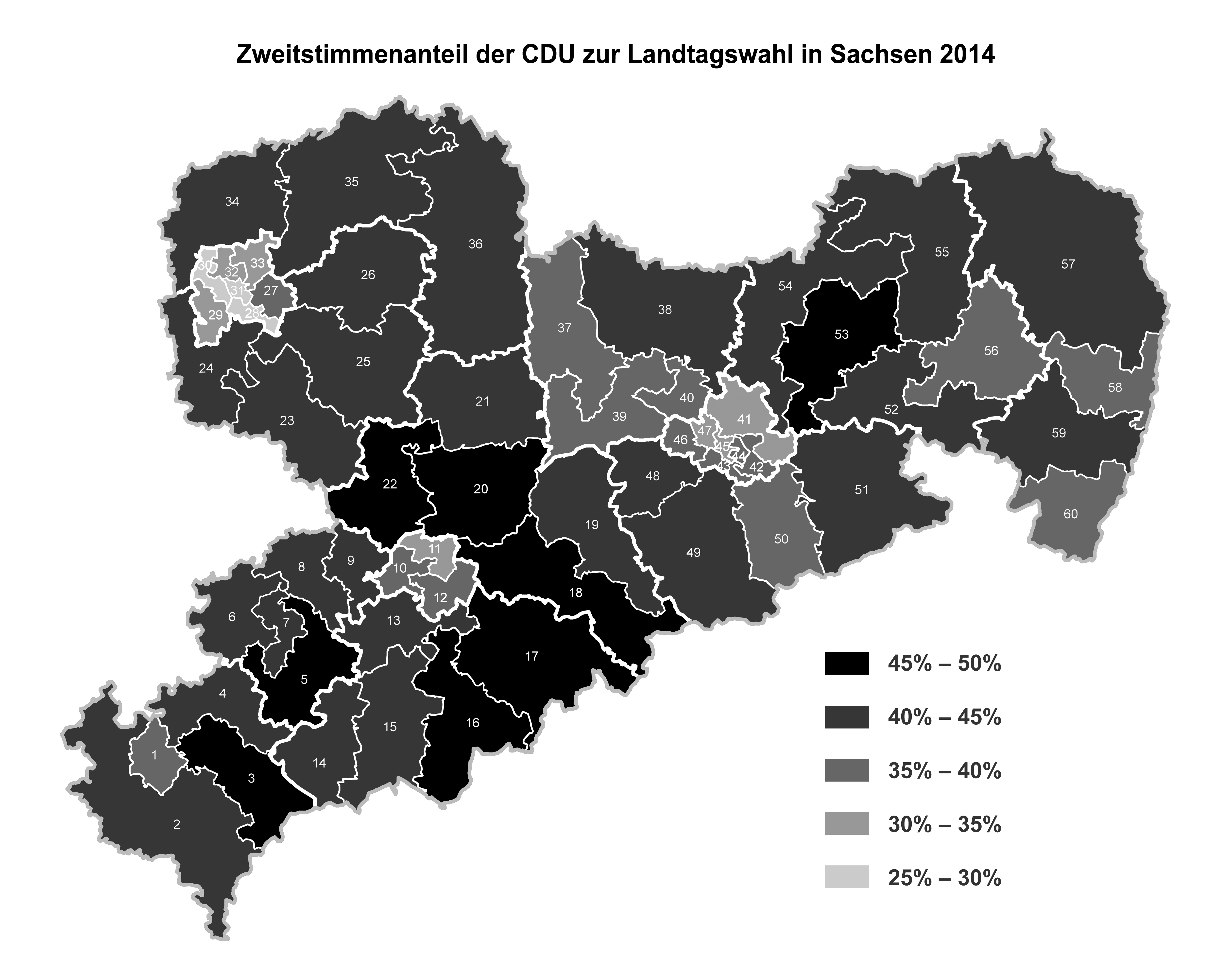 Karte mit den Wahlkreisen zur Landtagswahl in Sachsen 2014. Zu sehen sind die Zweitstimmenanteile der CDU in den einzelnen Wahlkreisen.